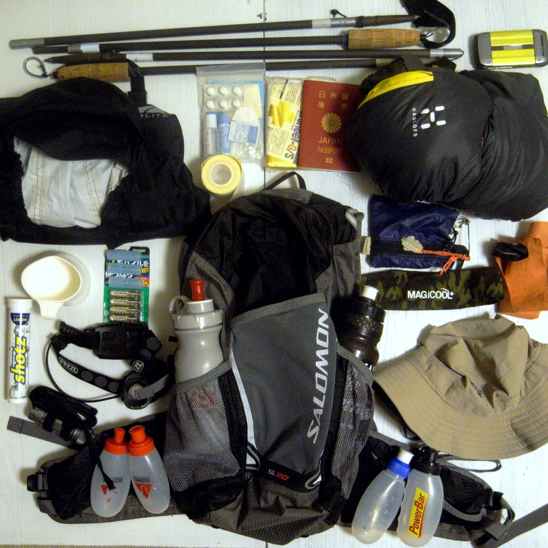 équipement pour la CCC 2009t